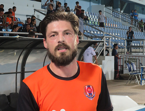 Björn Lindemann